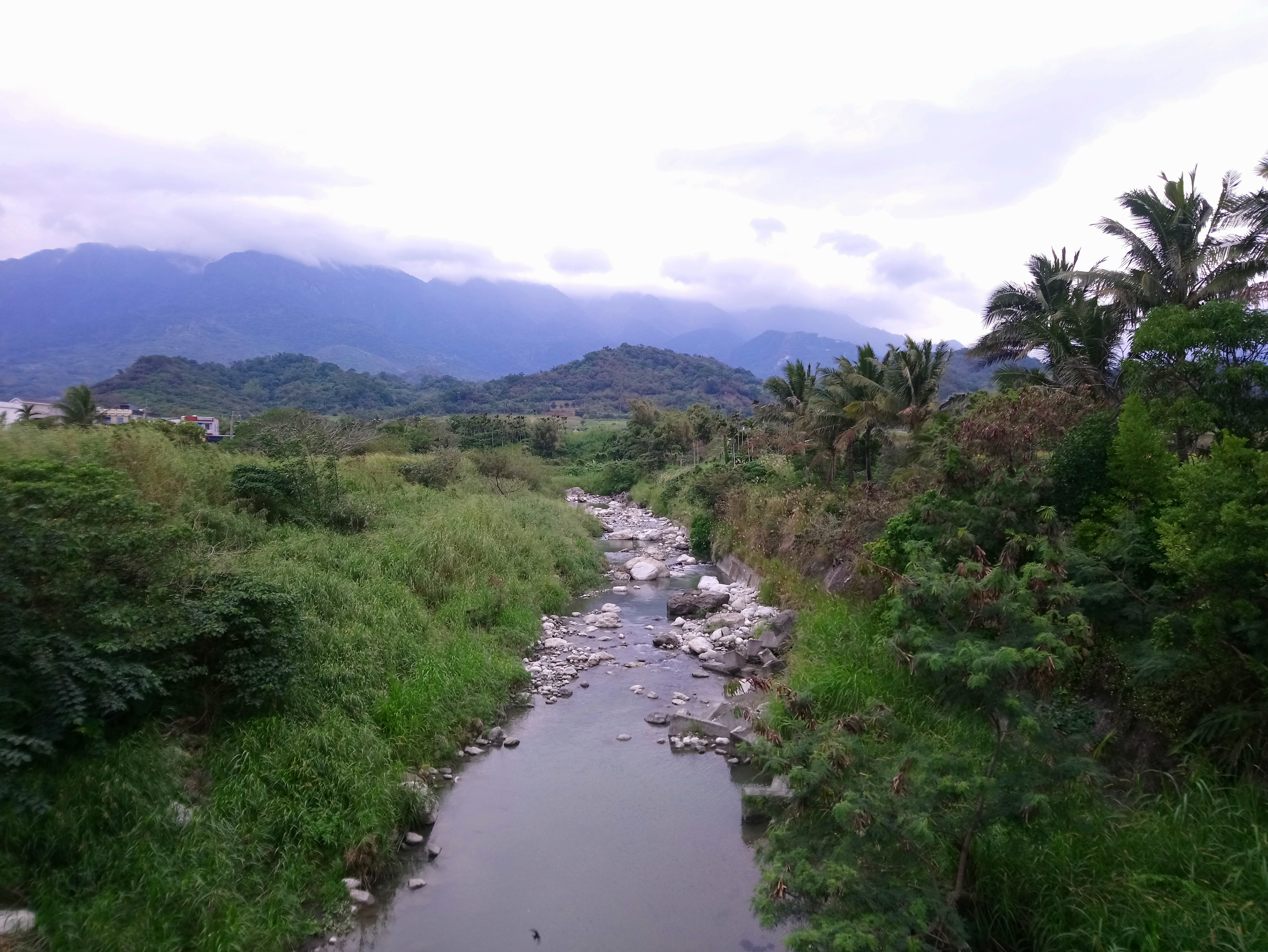 臺灣臺東縣成功溪